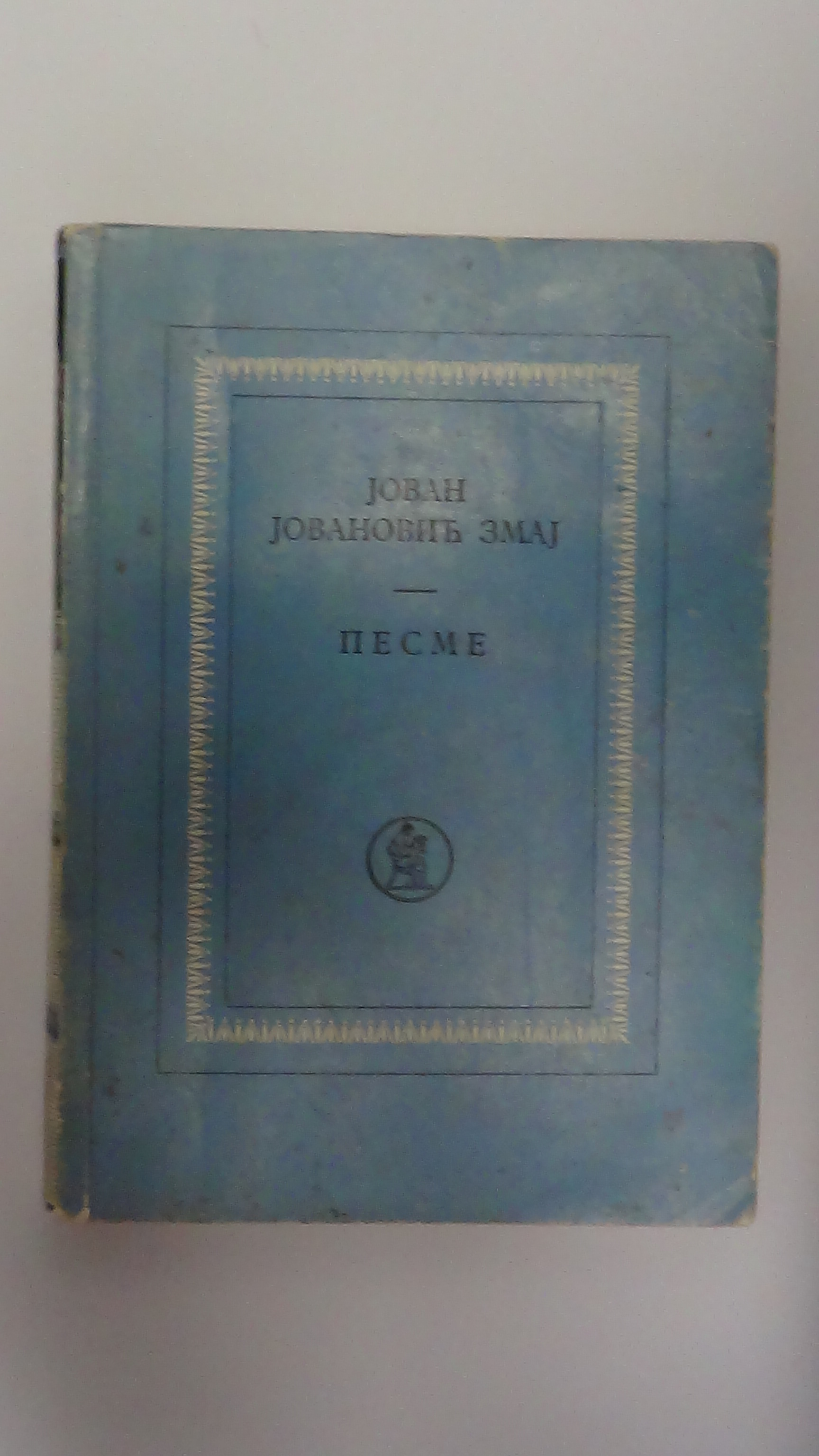 Корицата на збирката „Песни“, Рад, Белград, 1963.